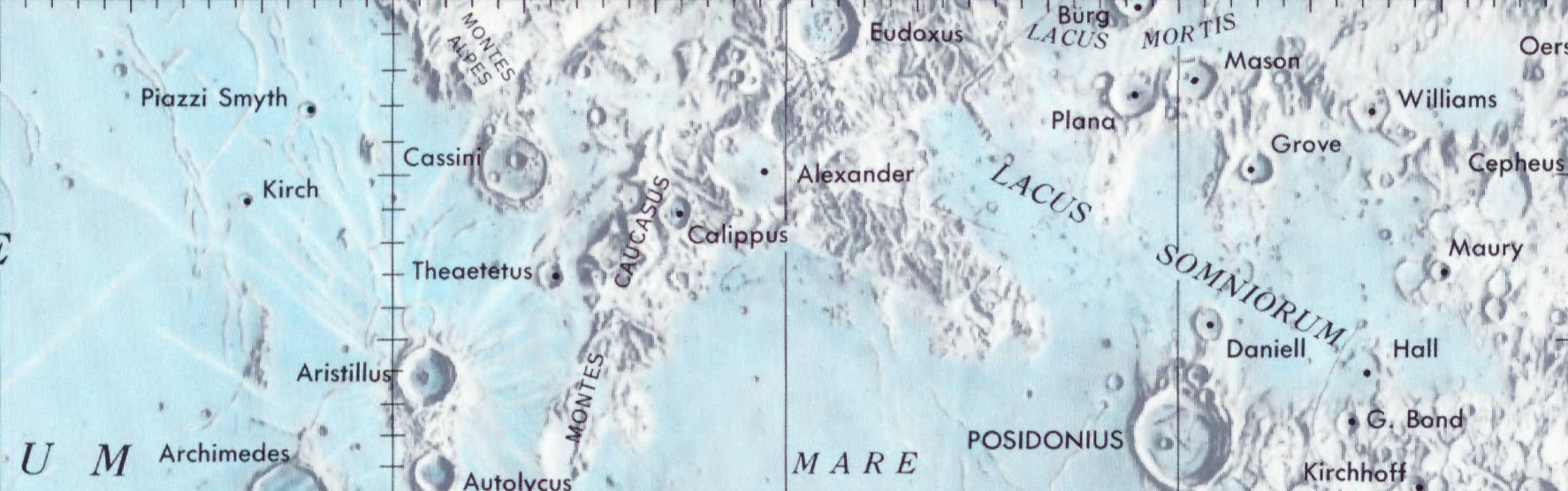 Cráter lunar Alexander. Localización. (Lunar Chart LPC1. Second Edition)